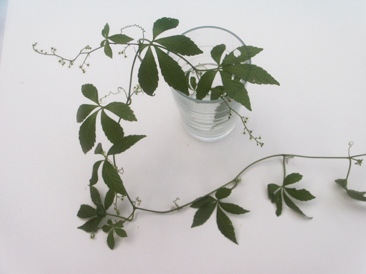 Jiaogulan - Gynostemma pentaphyllum details: flowers and leaves